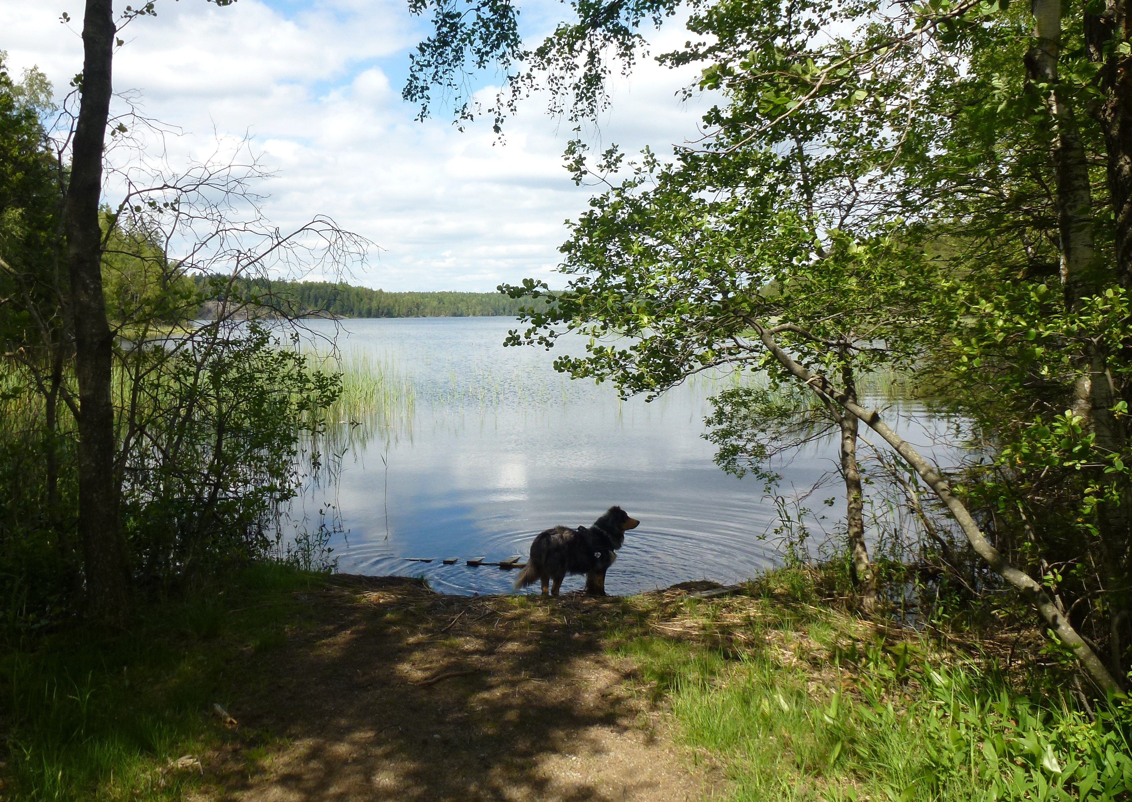 Stora skogssjön Botkyrka, vy mot norr